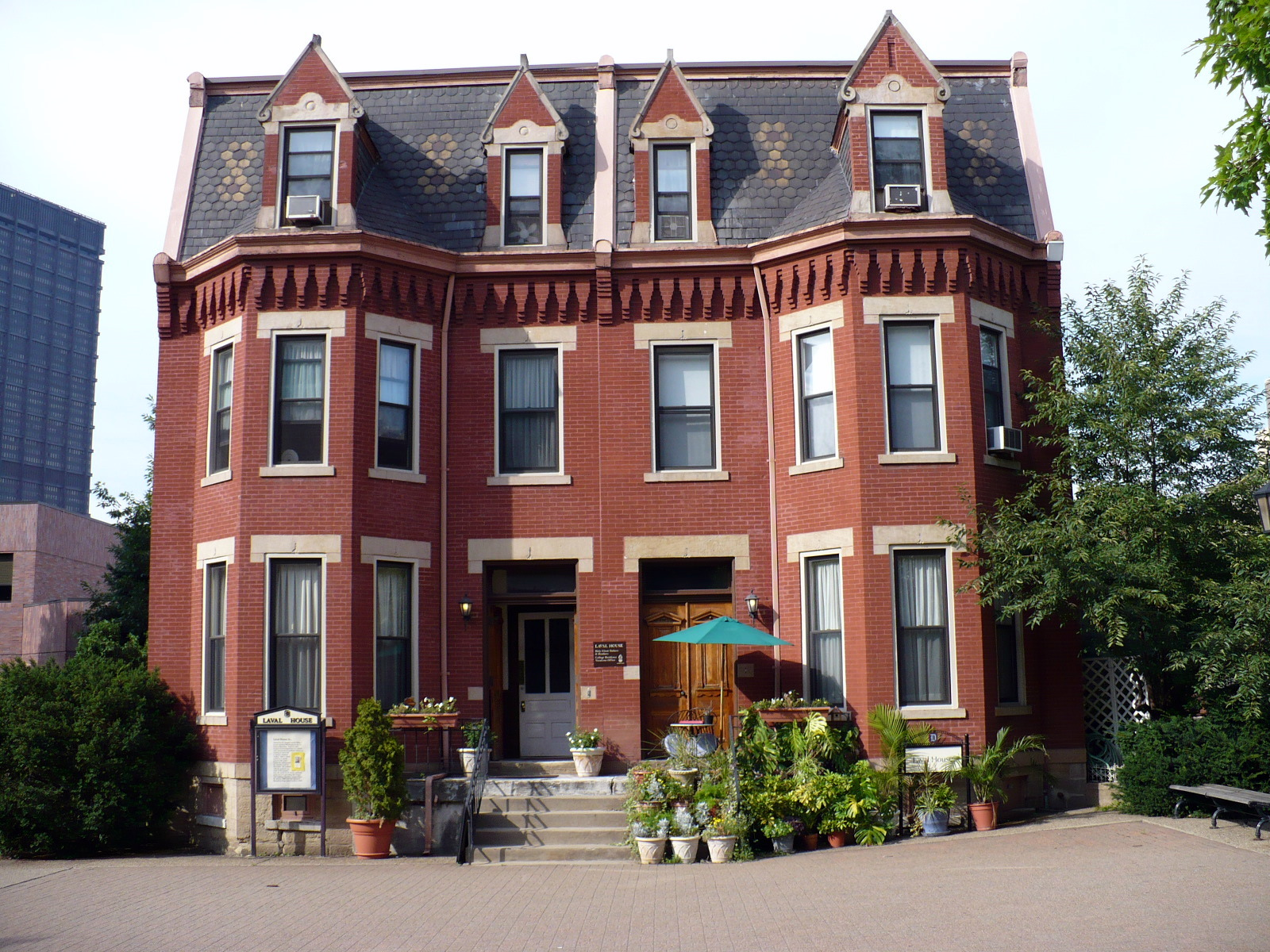 Duquesne University's "Laval House".